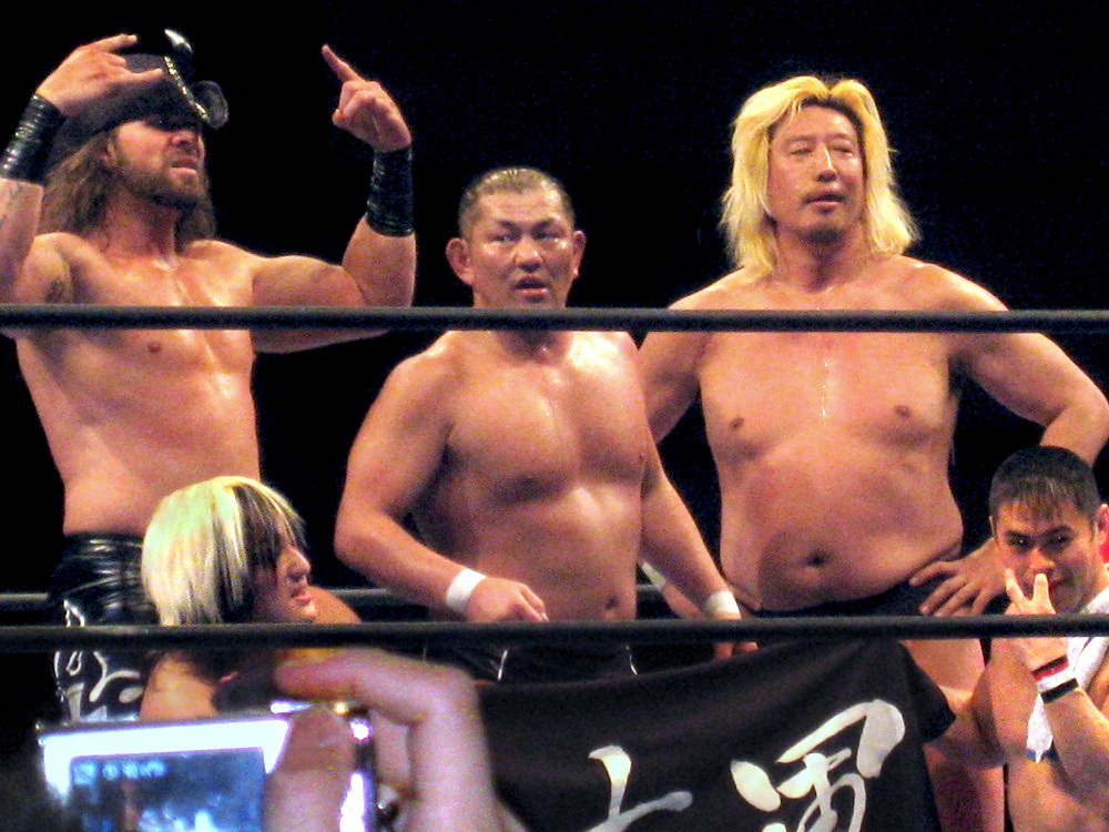 記念撮影に応じる鈴木軍のメンバー